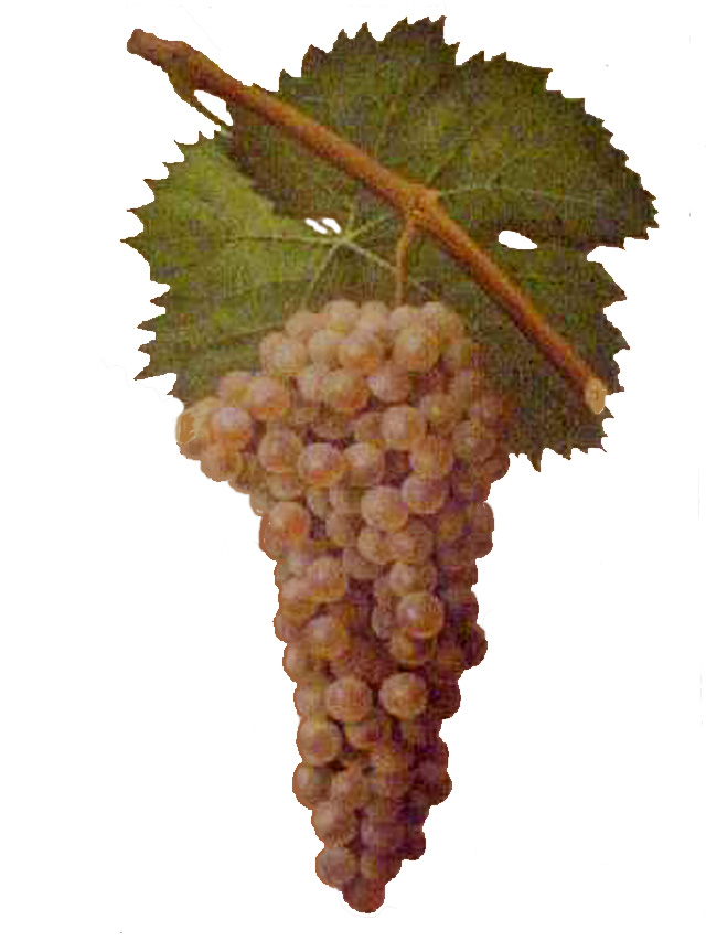 Grappe de Riminese par Viala et Vermorel